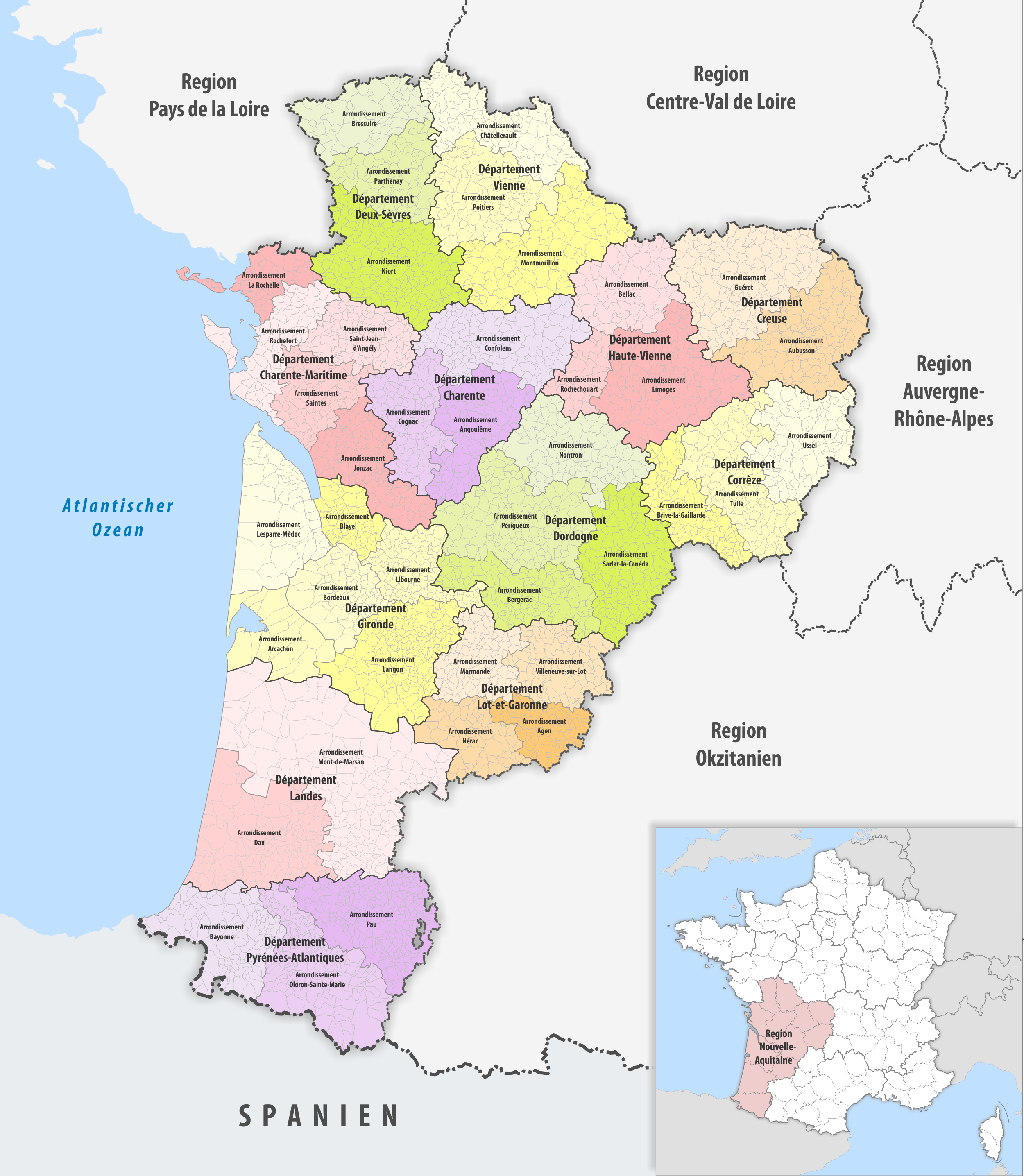 Gemeinden, Arrondissemente und Departemente in der Region Nouvelle-Aquitaine